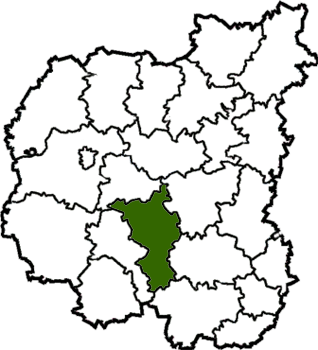 Nizhynskyi-Raion map